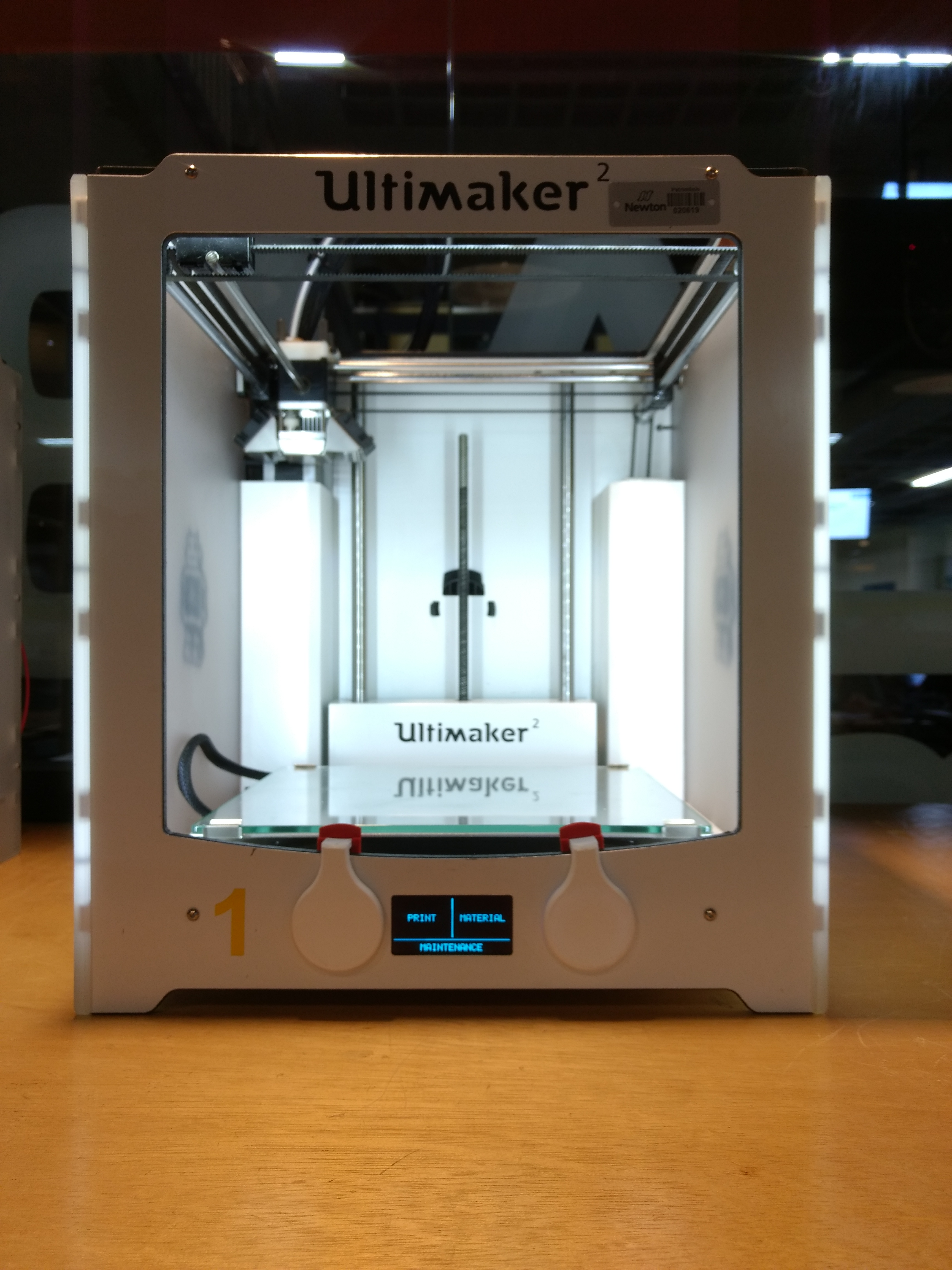 Impressora 3D disponível no FabLAB Newton